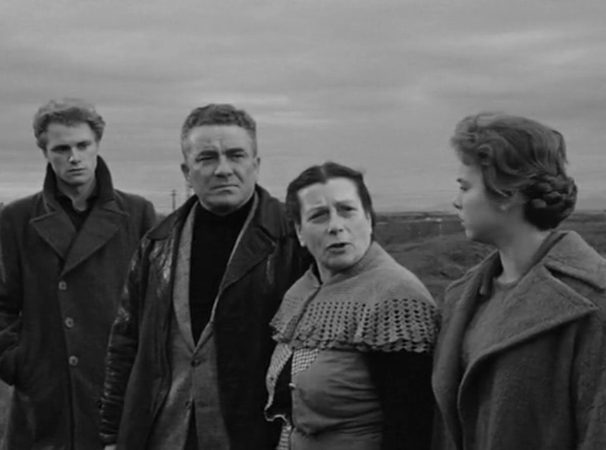 Fotogramma dal film Il tetto (1956) di Vittorio De Sica. Da sinistra: Giorgio Listuzzi, Ferdinando Gerra, Carolina Ferri, Gabriella Pallotta.